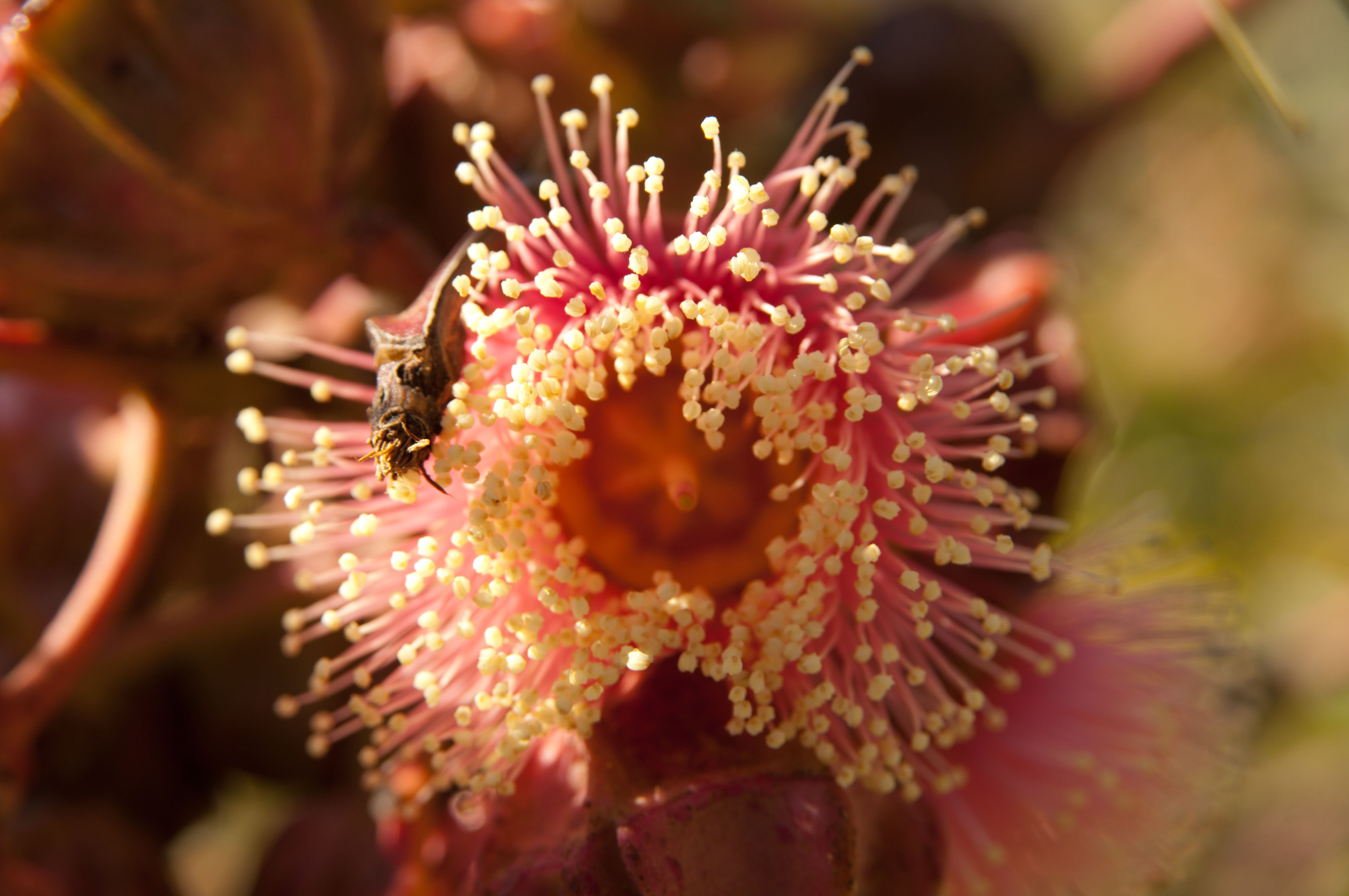 Eucalyptus kingsmillii